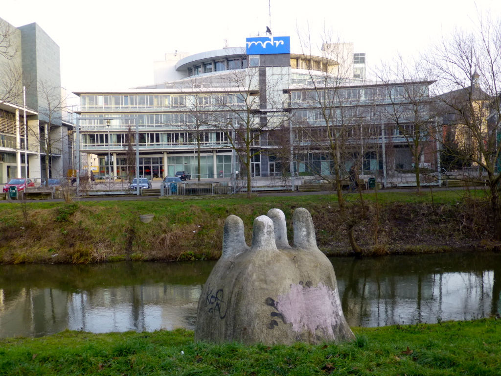 Mitteldeutscher Rundfunk mit Sitz in Halle/Salle, im Vordergrund die Steinplastik Milchstraße von Janek Kruszynski [1]